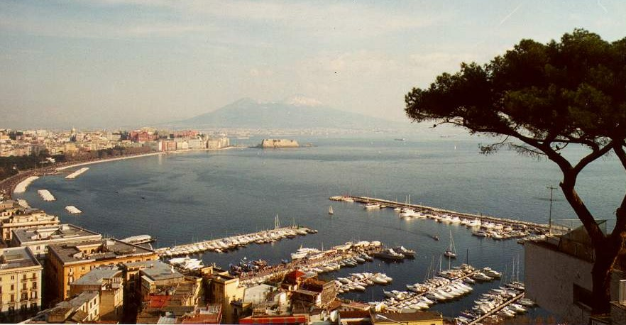 Il Porto di Mergellina in Napoli